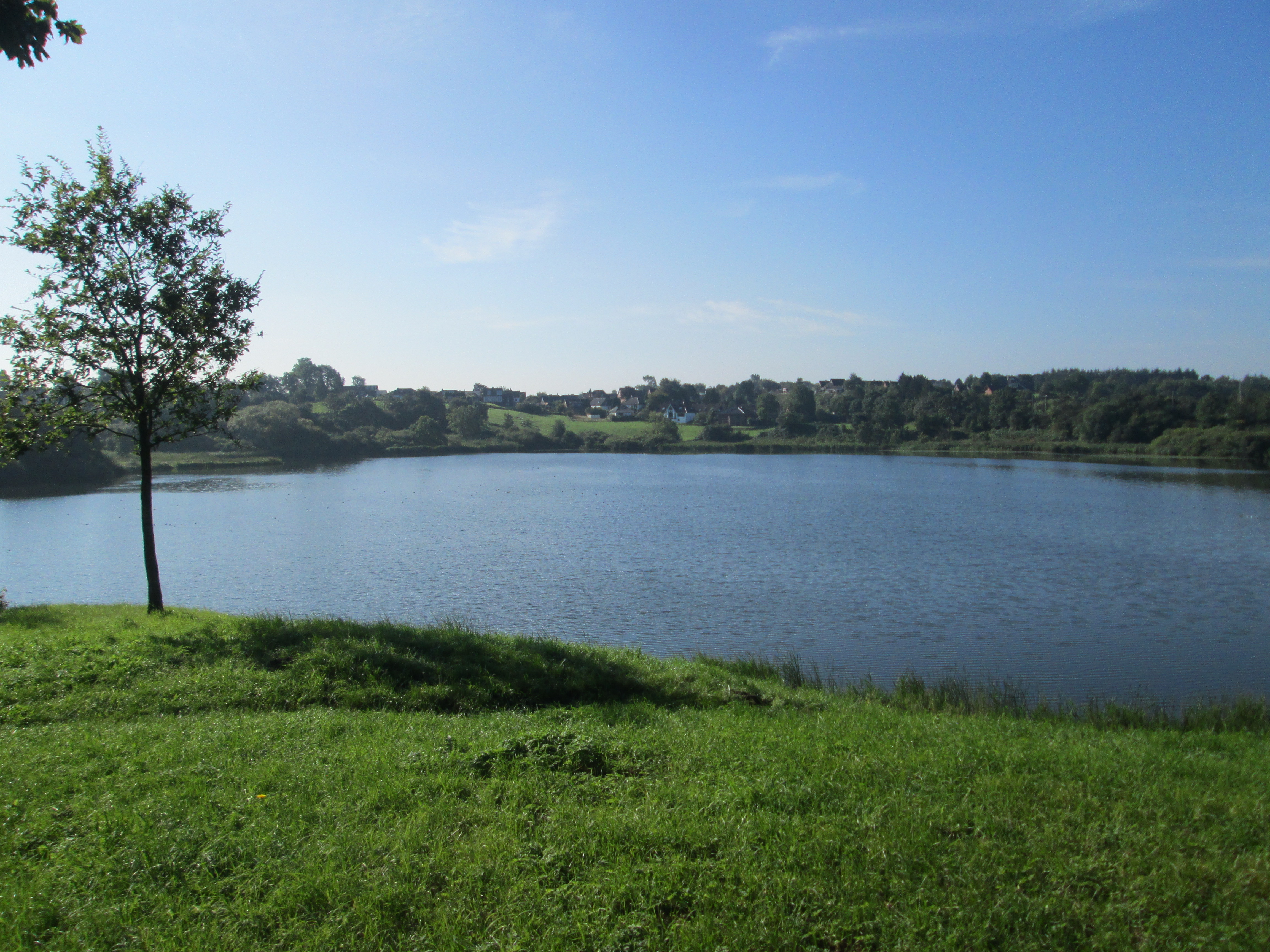 Bustrupdam ved Slesvig-Frederiksberg / Busdorfer Teich bei Schleswig-Friedrichsberg